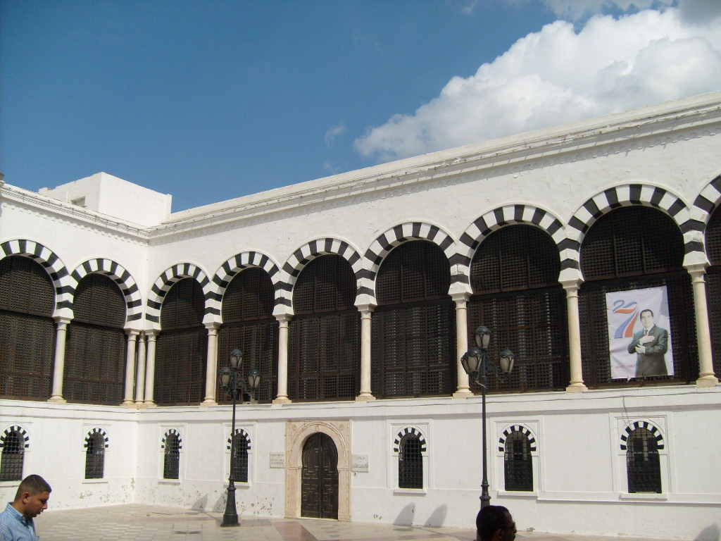 Siège du secrétariat général du gouvernement tunisien dans la médina de Tunis